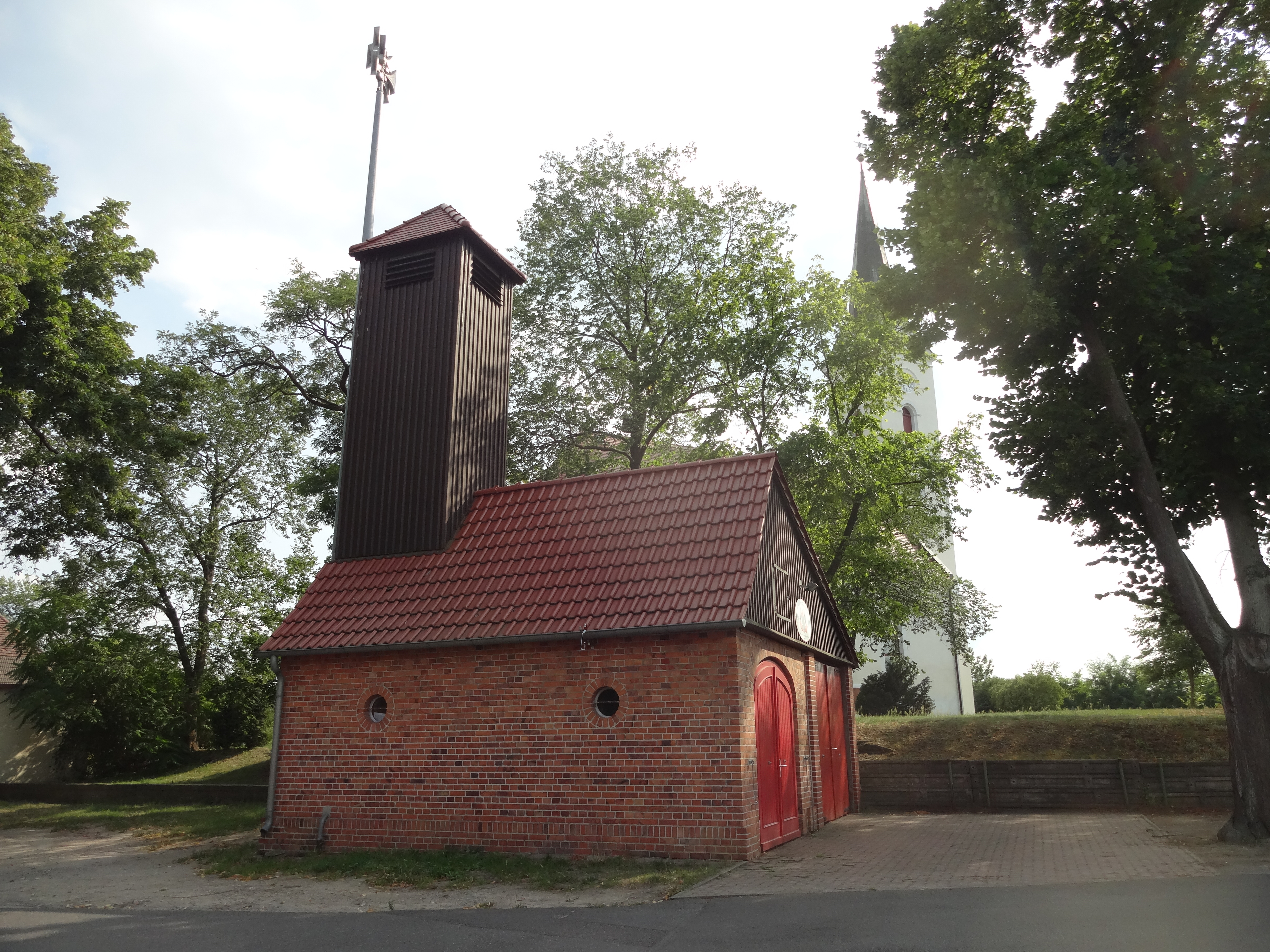 denkmalgeschützte Dorfkirche Zerkwitz davor die Feuerwehr